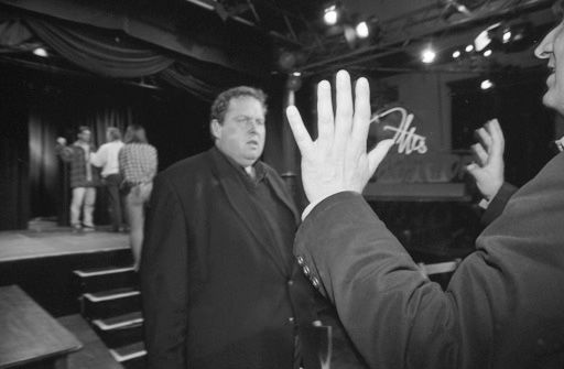 Ottfried Fischer bei Vorbereitungen zu Ottis Schlachthof